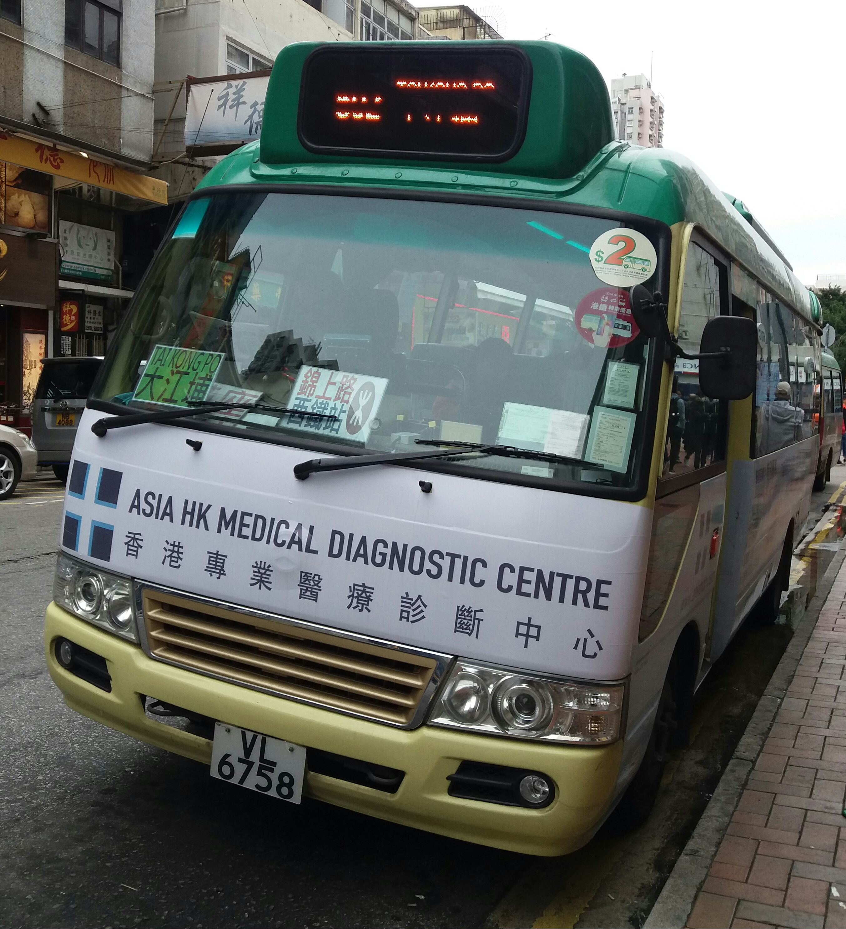 中文（香港）: 新界區專線小巴602線